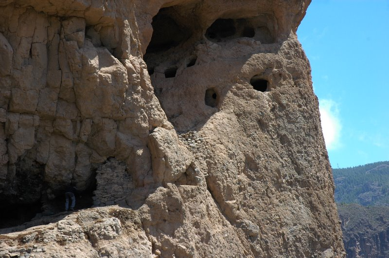 Cuevas de Acusa en Artenara